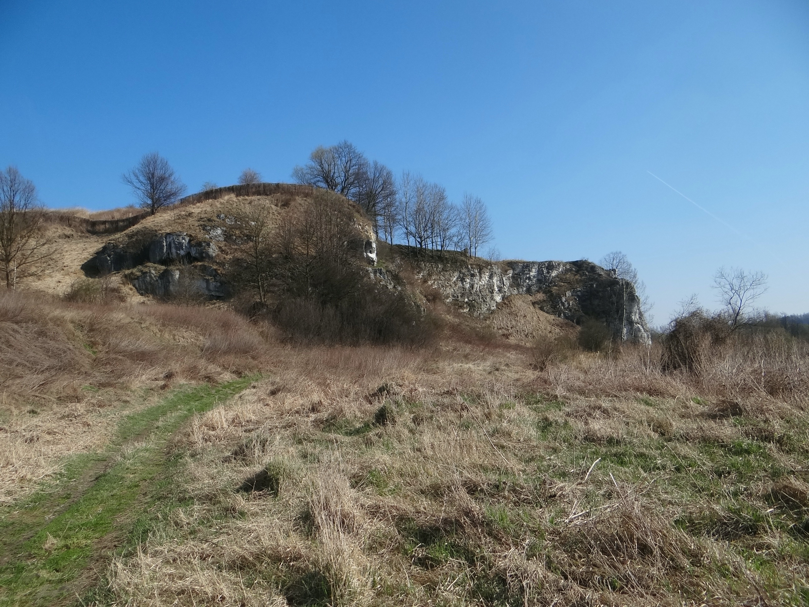 Okrążek w grupie SkałekPiekarskich